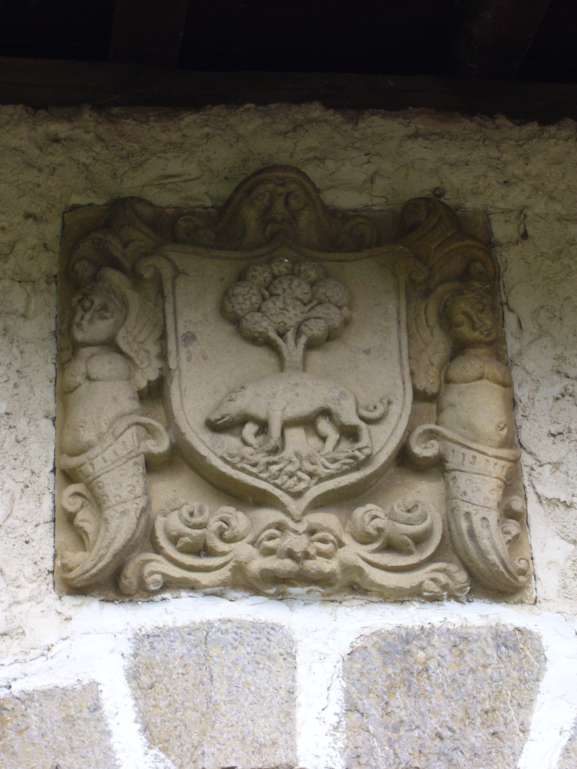 Gorostiola baserriko armarria